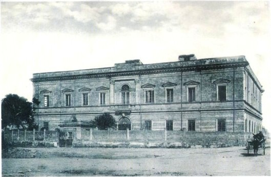 Vecchia foto Pia Opera Pastore